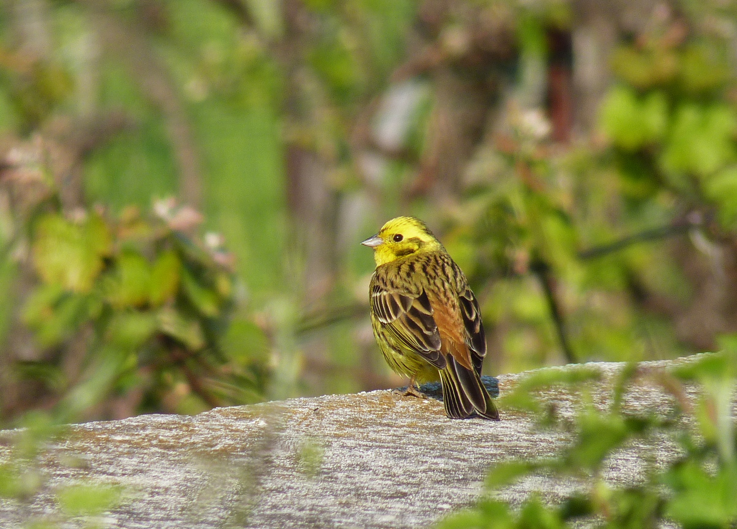 Goldammer (Emberiza citrinella)